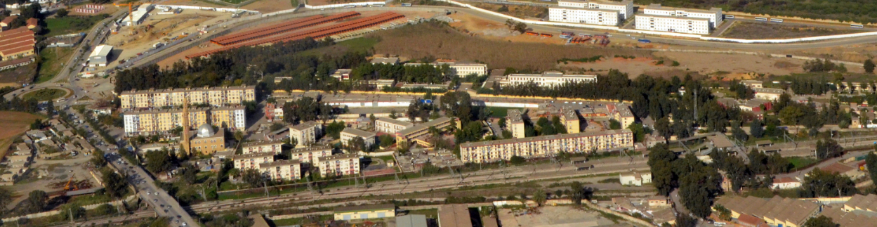 Vue aérienne de la commune de Oued Smar